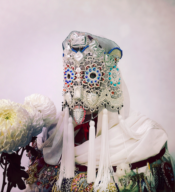 Maske, wearable art, laget av Magnhild Kennedy, kunstnernavn Damselfrau